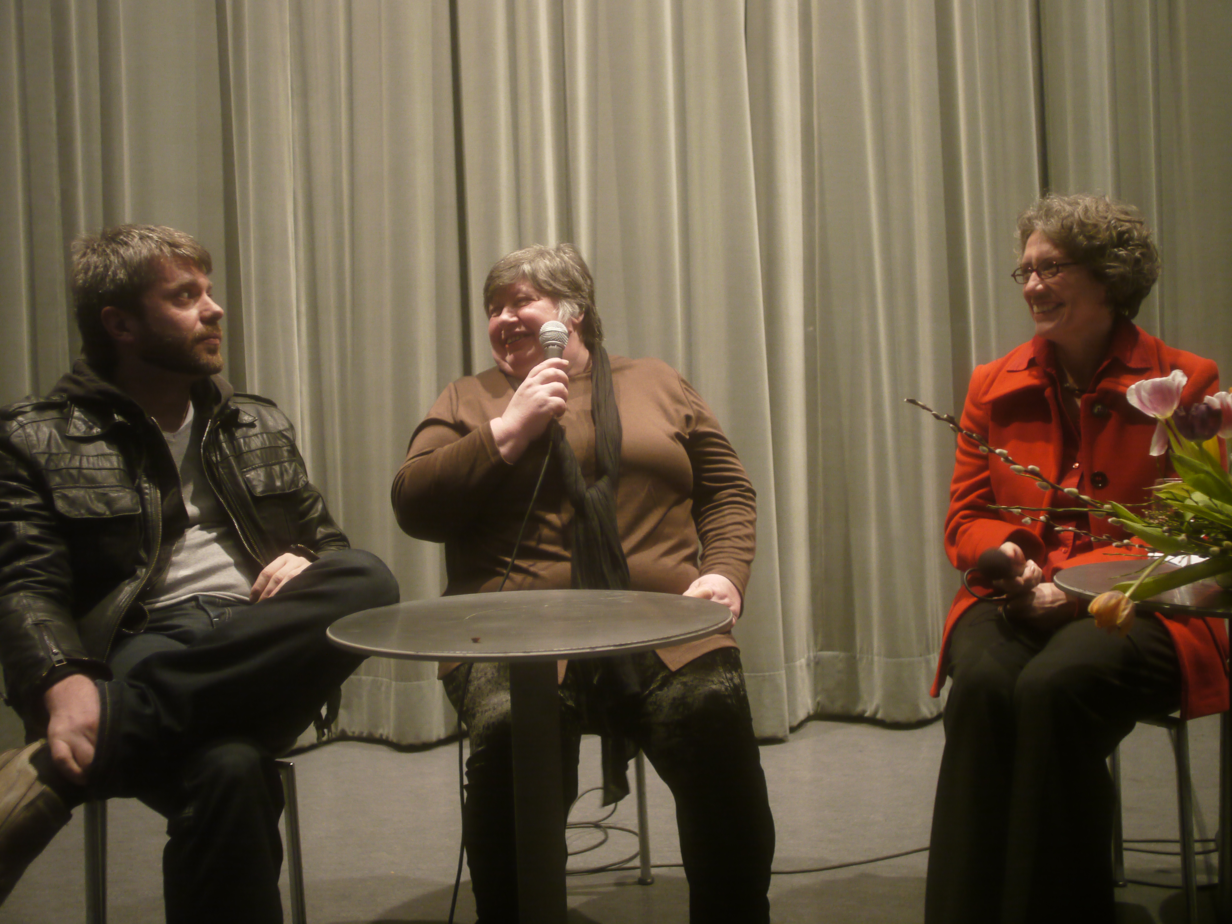 Ivan Siljic bei den Wiener FrauenFilmTagen 2010